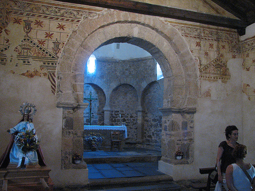 Santo Tomás de las Ollas, Ponferrada, León: interior.